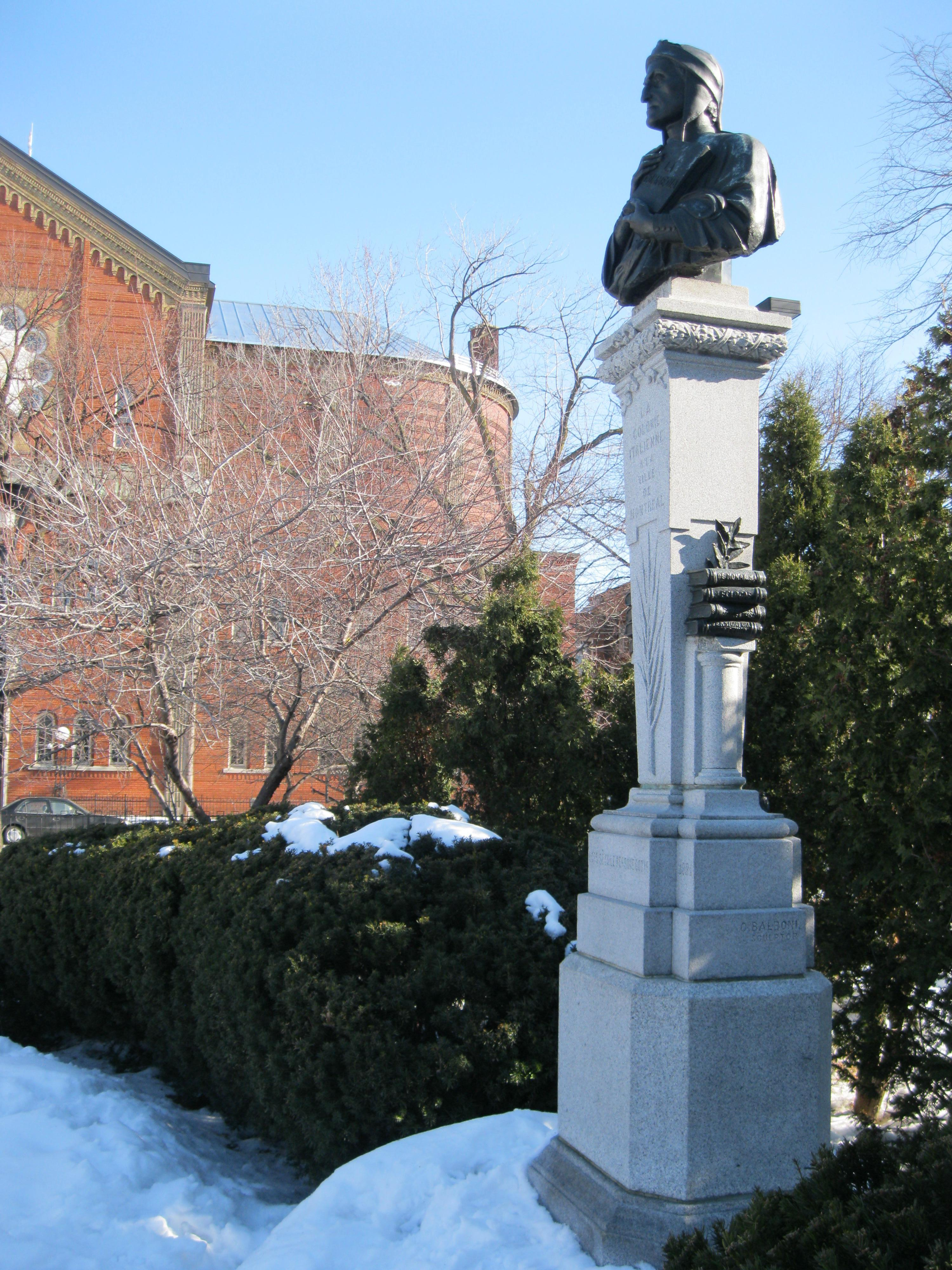 La mort de Dante est un monument au poète italien Dante Alieghieri réalisé par Carlo Balboni (1860-1947) en 1921. Il est situé au parc Dante, rue Dante, Montréal.